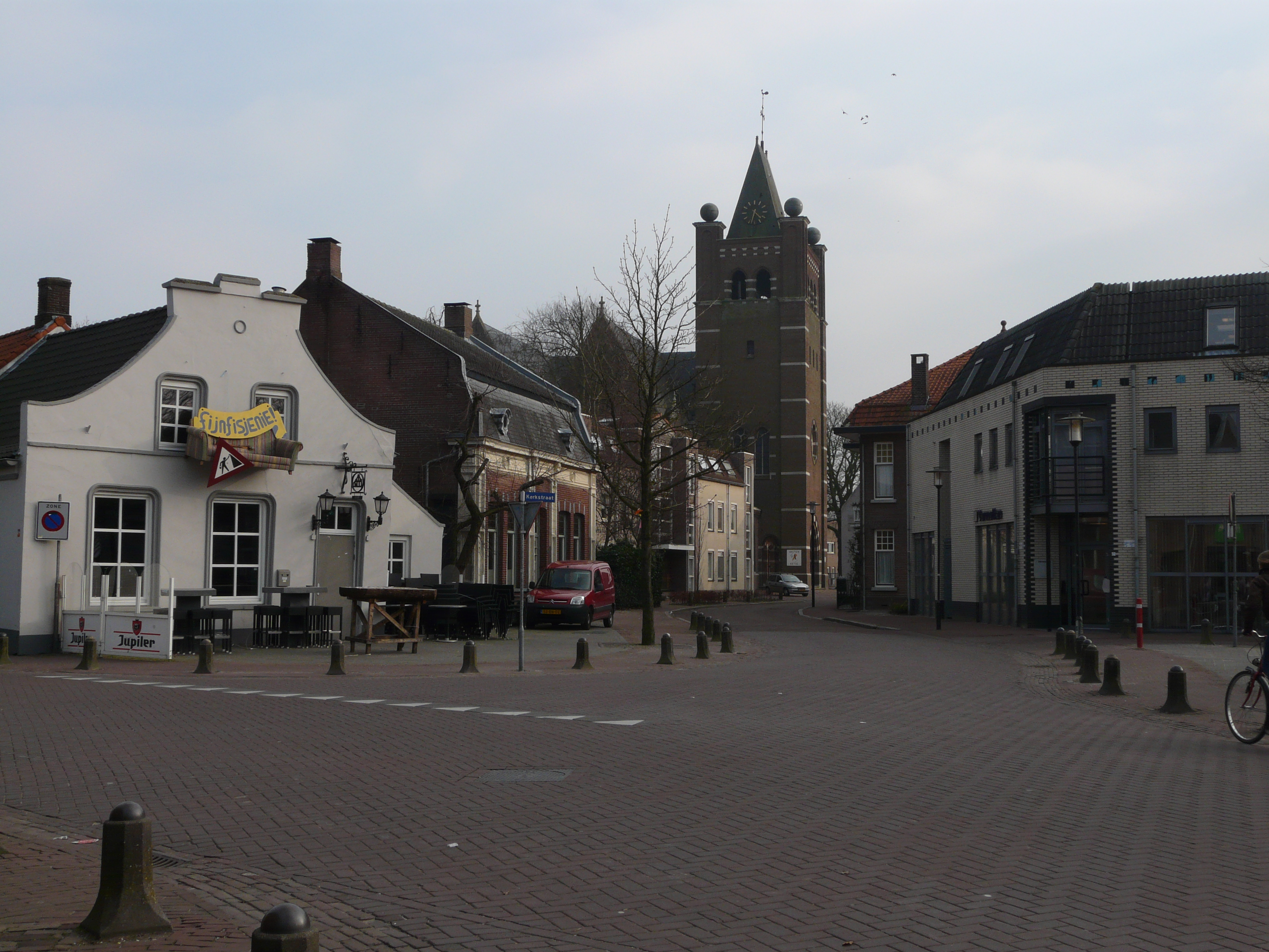 Straat in Gilze